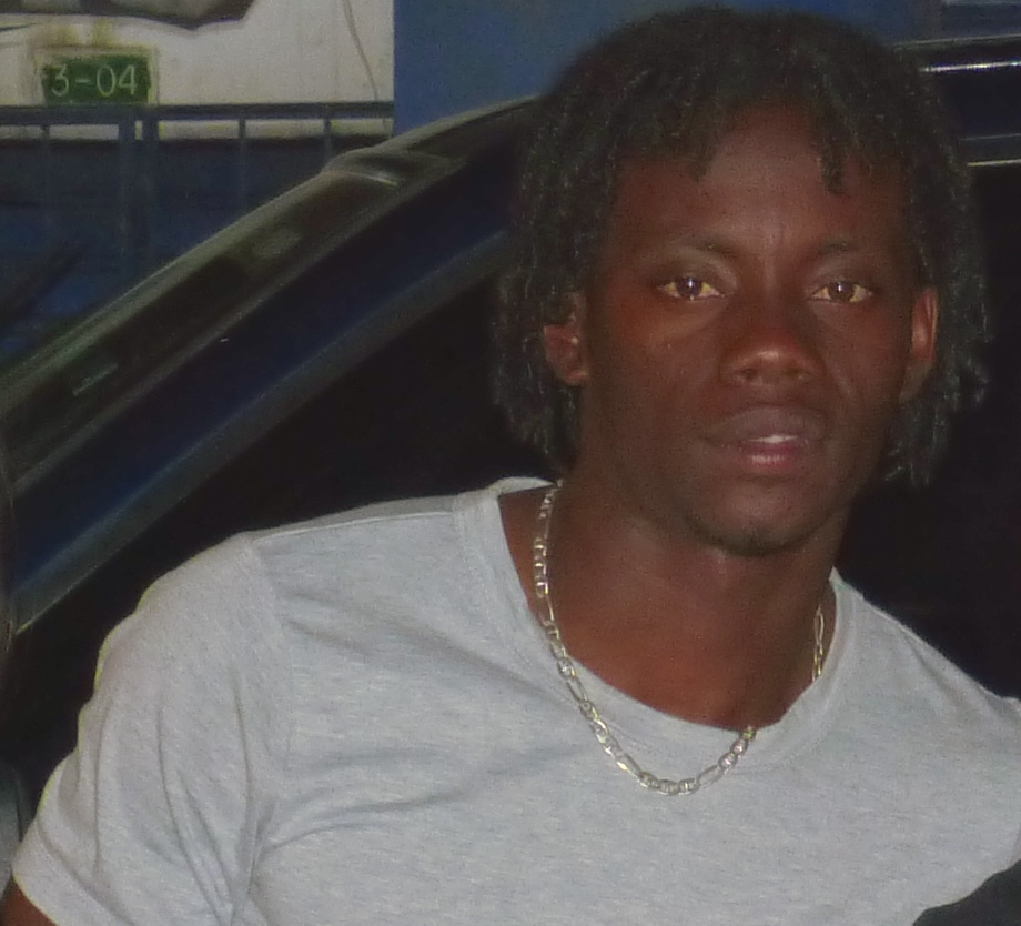 Juan Carlos Paredes